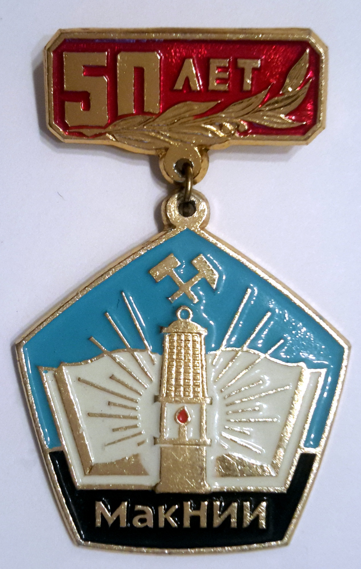 Юбилейный значок МакНИИ (символика института) к 50-летнему юбилею создания.